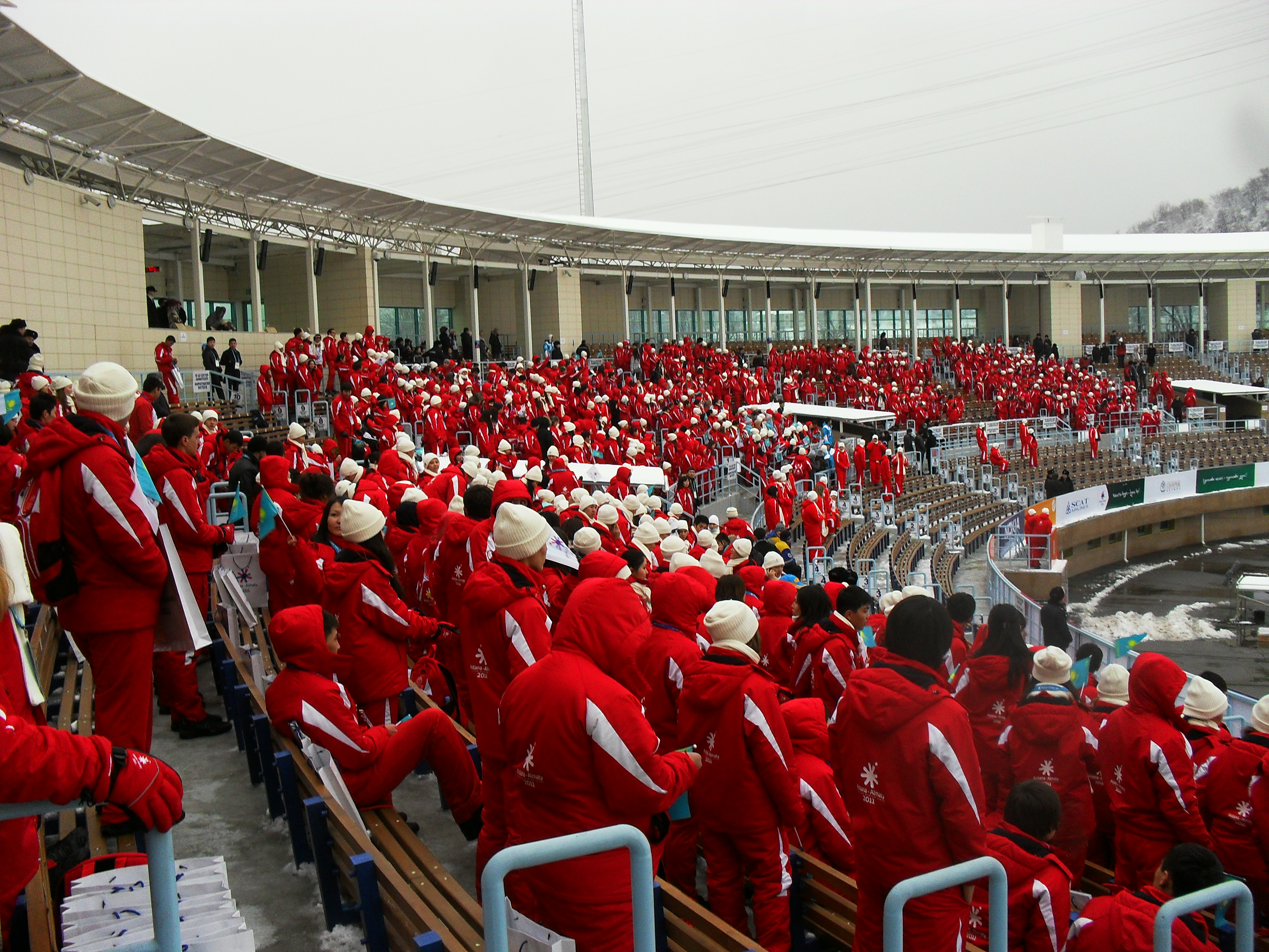 7-е зимние Азиатские игры. Волонтёры на Международном комплексе лыжных трамплинов.